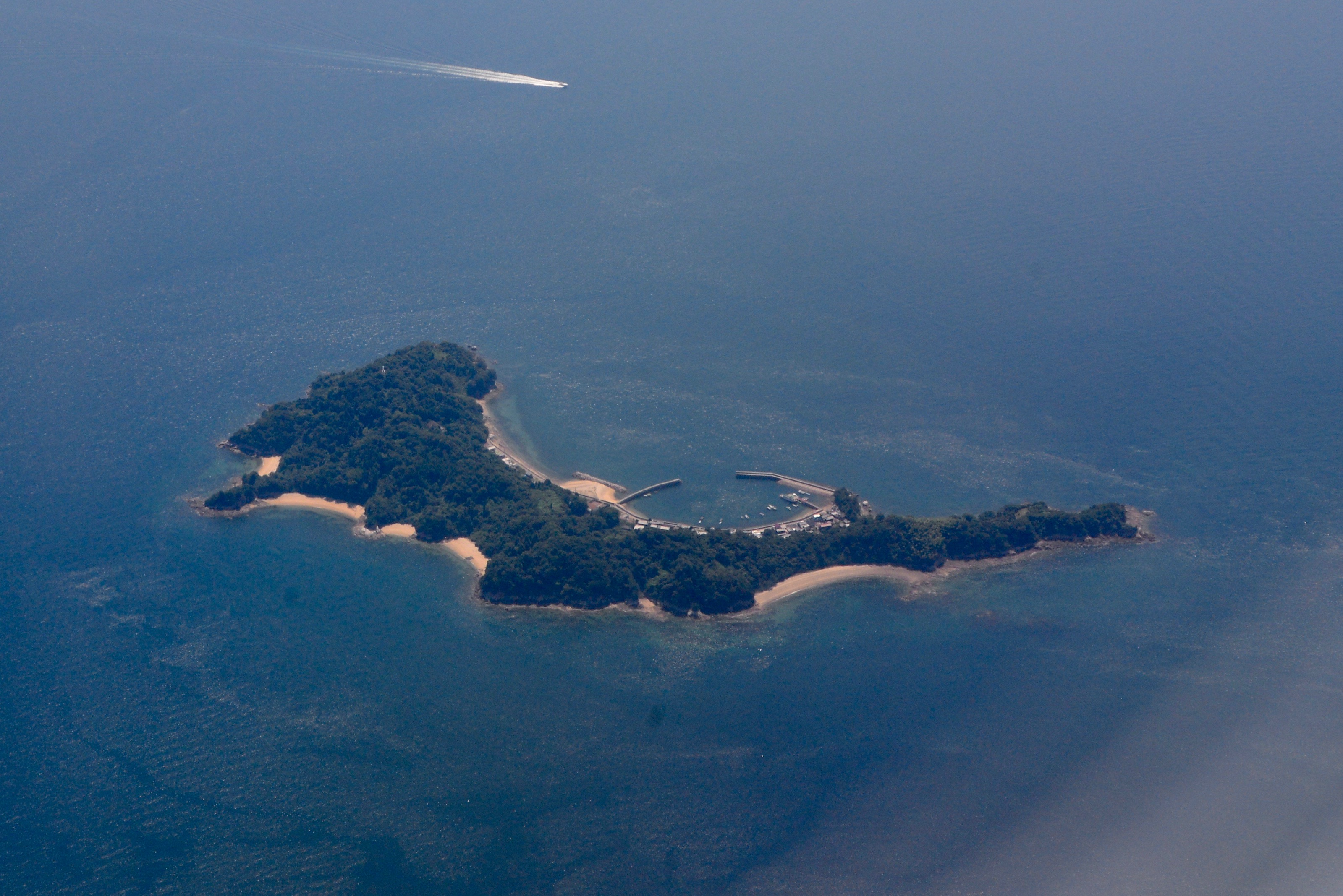 愛媛県松山市安居島